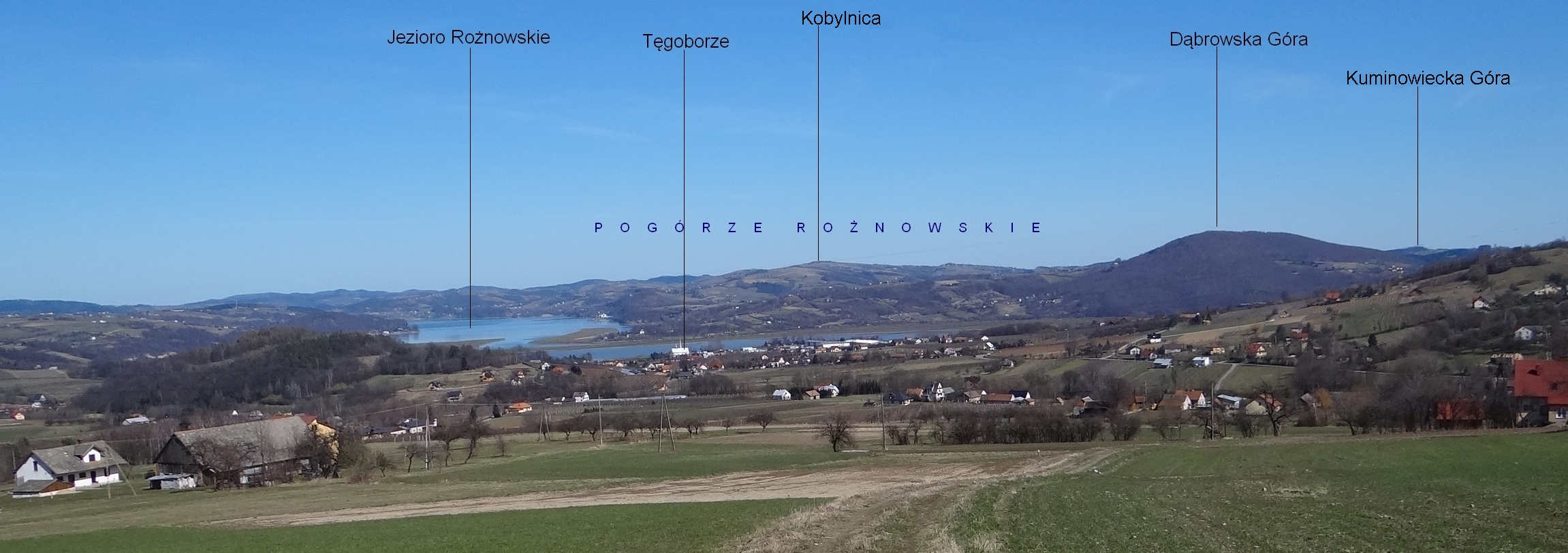 Widok na Jezioro Rożnowskie i Pogórze Rożnowskie